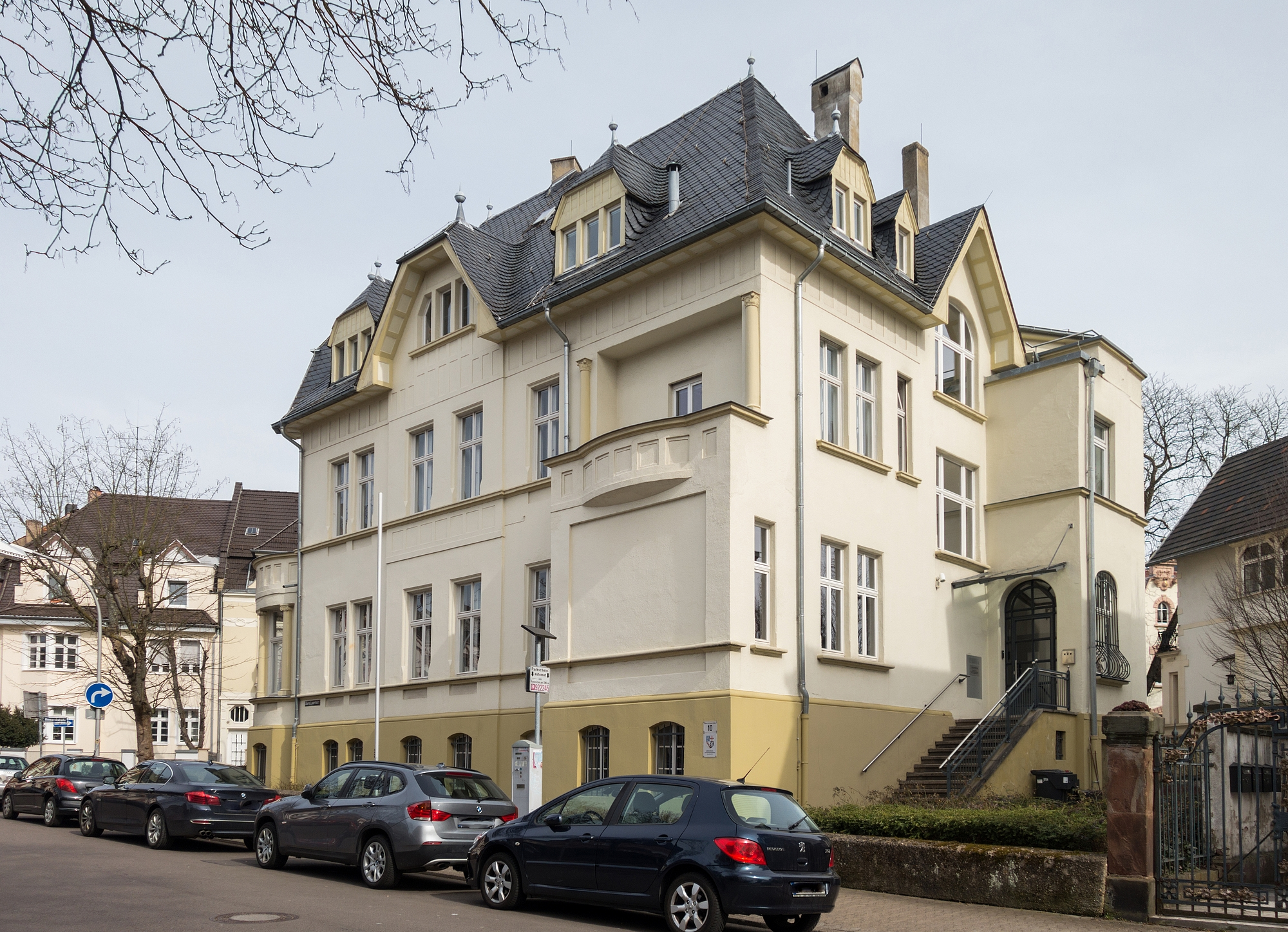 Arbeitsgericht Saarbrücken in der Oberen Lauerfahrt 10.